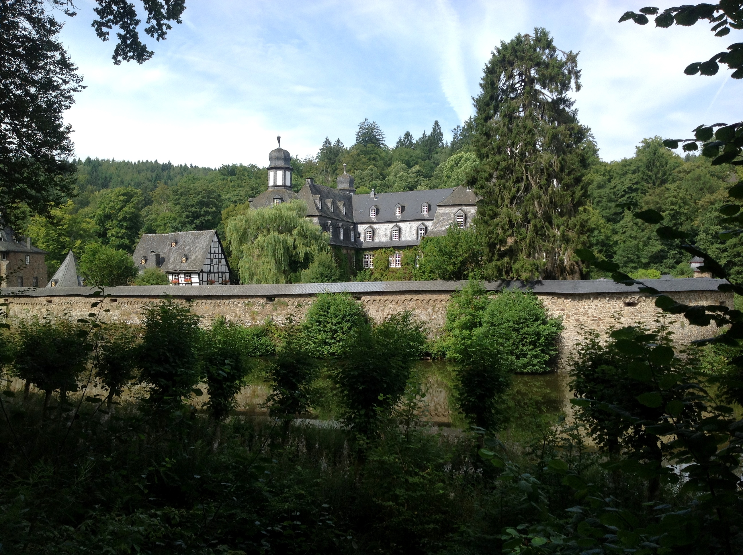 Schloss Crottorf, Landkreis Altenkirchen (Westerwald).